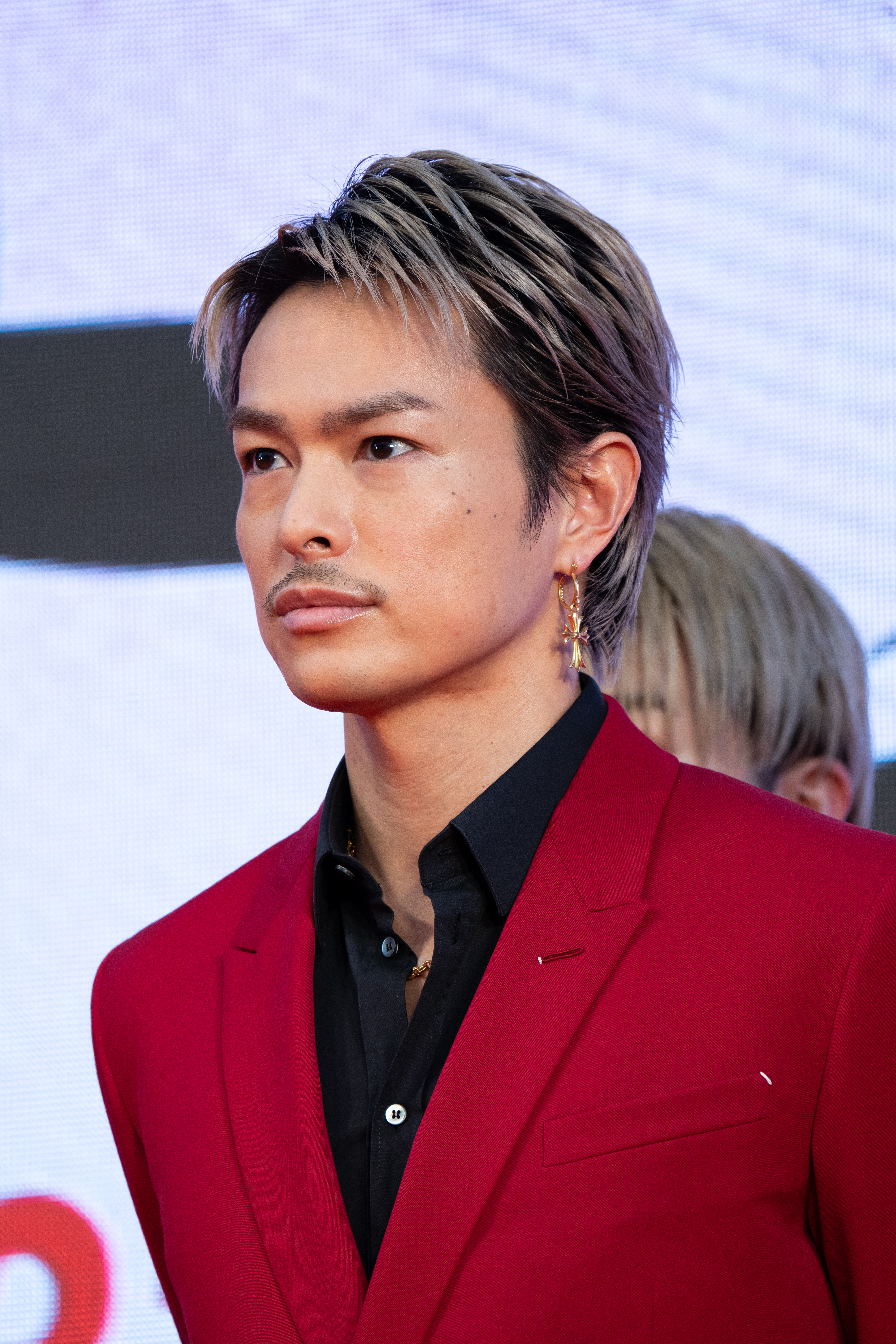 第32回 東京国際映画祭 オープニングセレモニー 今市隆二 (その瞬間、僕は泣きたくなった)